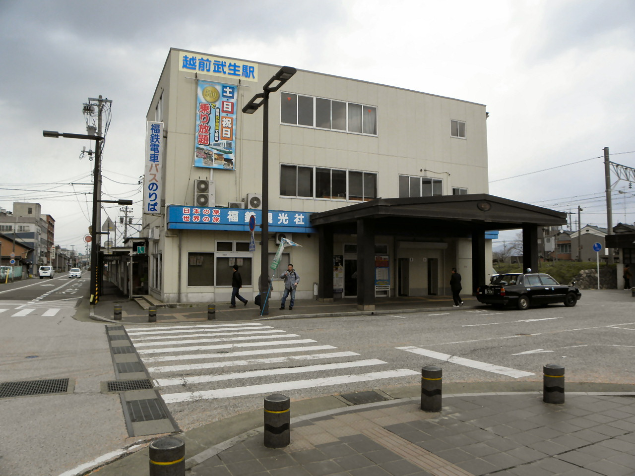 福井鉄道 越前武生駅(旧名 武生新駅)